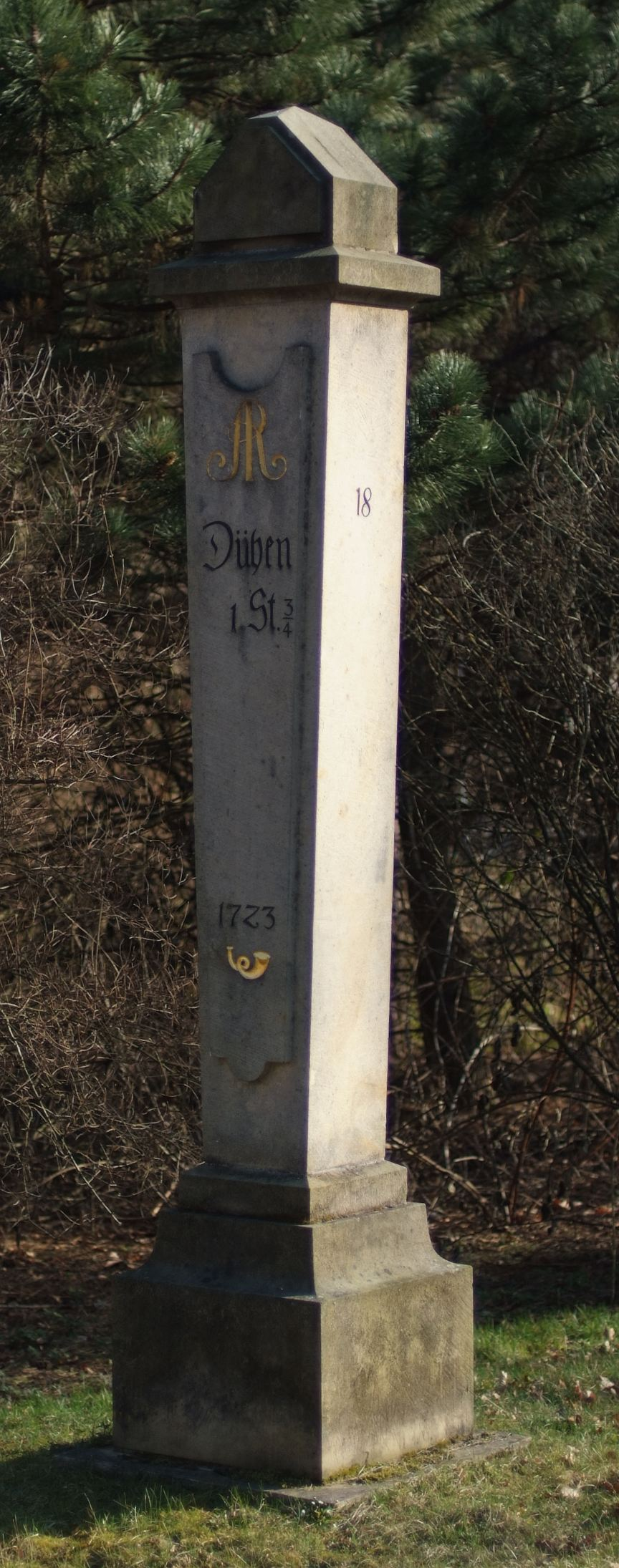 kursächsische Halbmeilensäule in Tornau, OT Eisenhammer